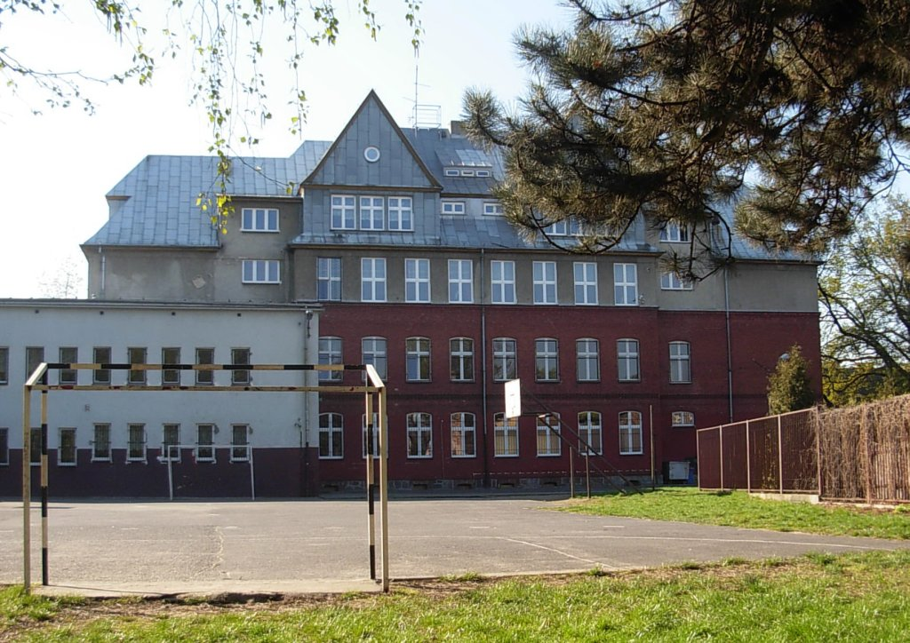 Szkoła podstawowa nr 11 (1894, nadbudowa 1912-1913) - ul. gen. H. Dąbrowskiego 8 w Bydgoszczy